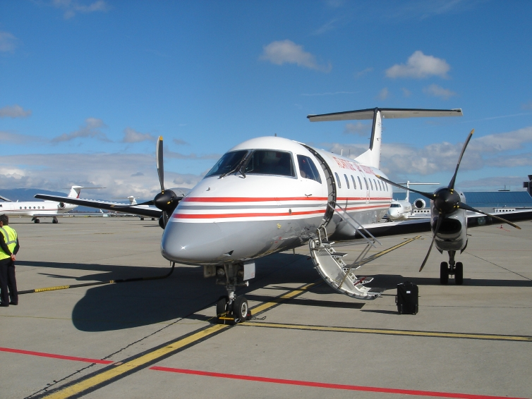 Atlantique Air Assistance (TLB) Embraer 120 Brasilia at Geneva Airport (GVA)